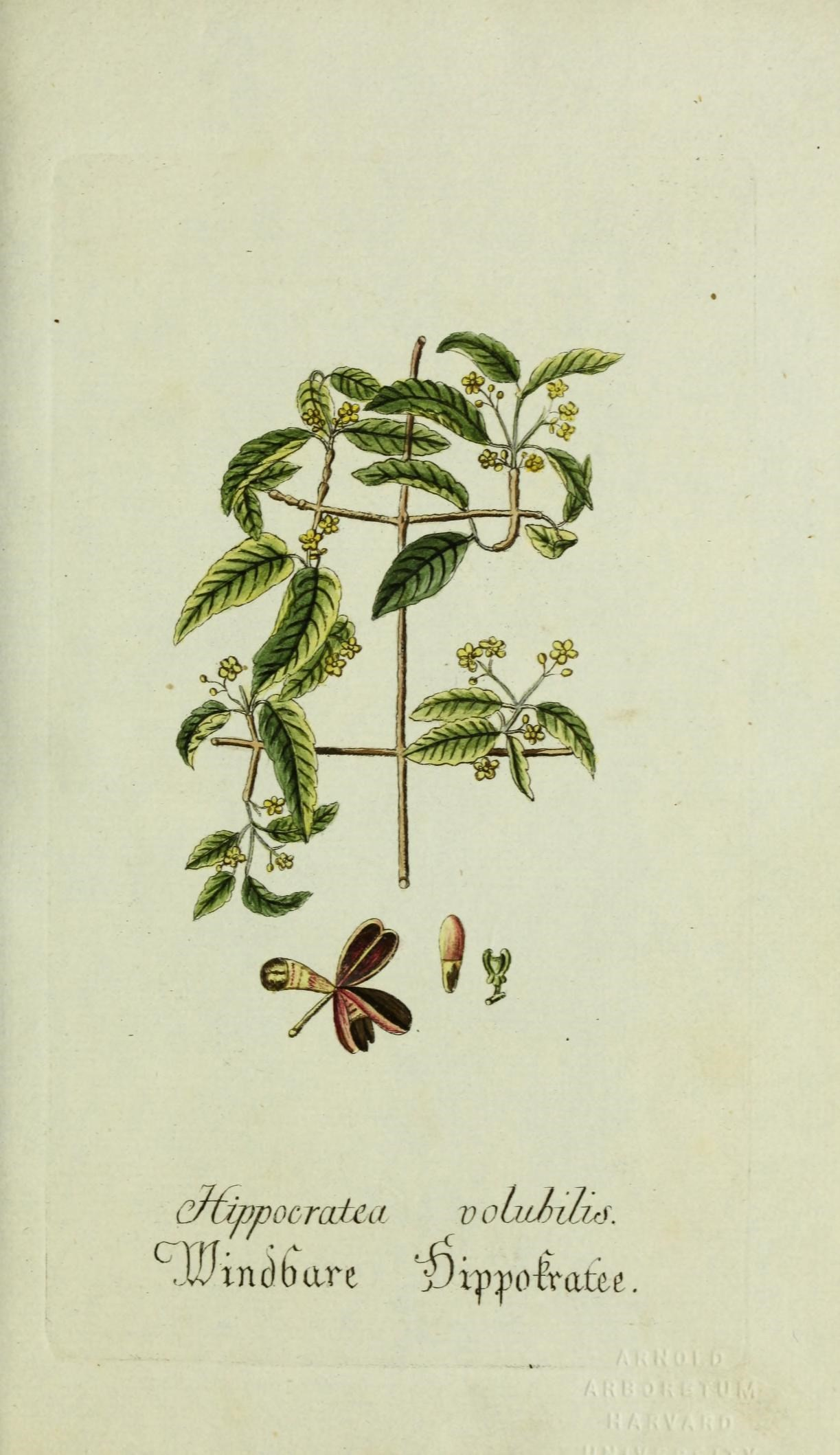 Plantarum indigenarum et exoticarum icones ad vivum coloratae, oder, Sammlung nach der Natur gemalter Abbildungen inn- und ausländlischer Pflanzen, für Liebhaber und Beflissene der Botanik /